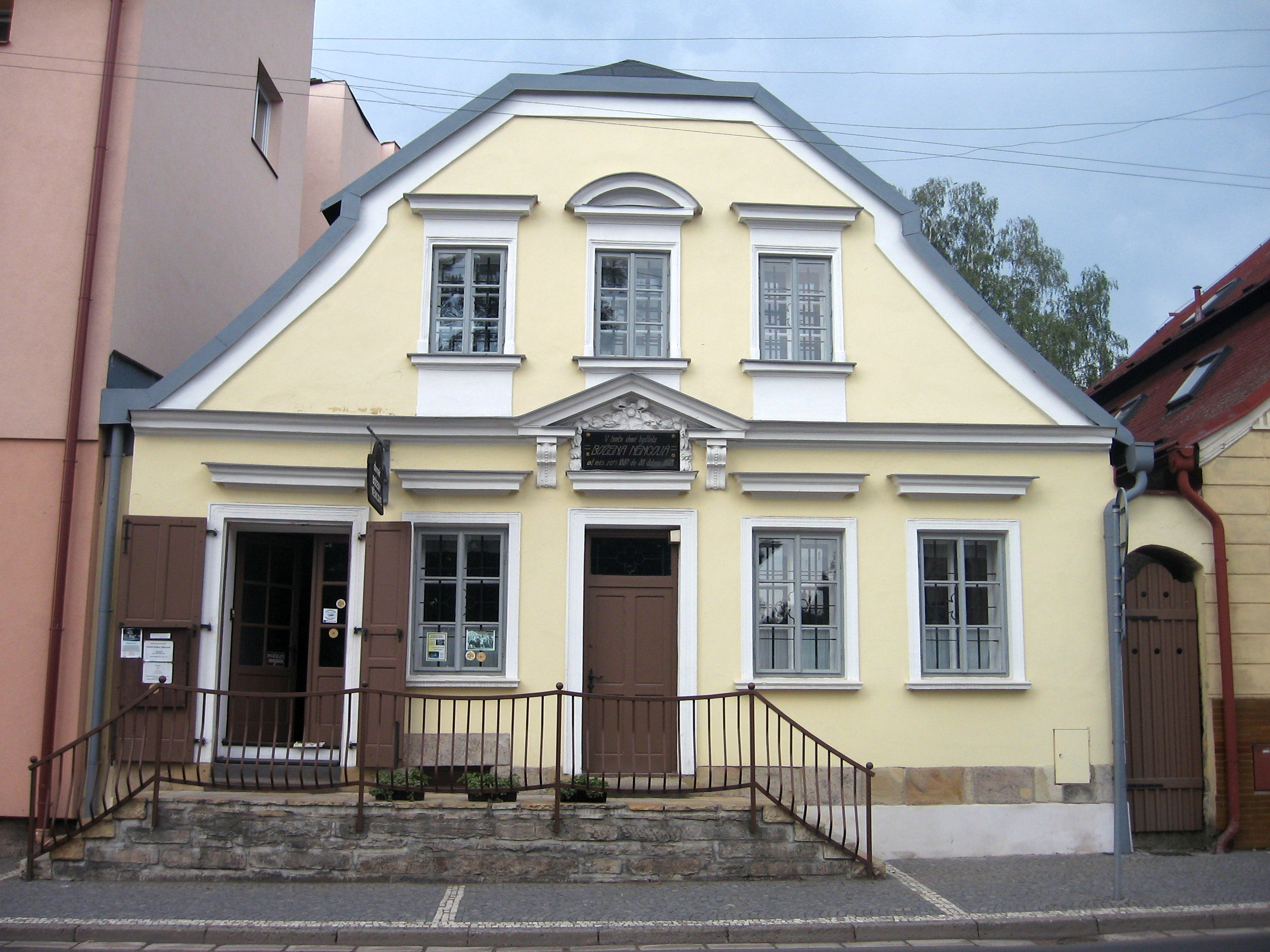 Městský dům Boženy Němcové (Červený Kostelec)